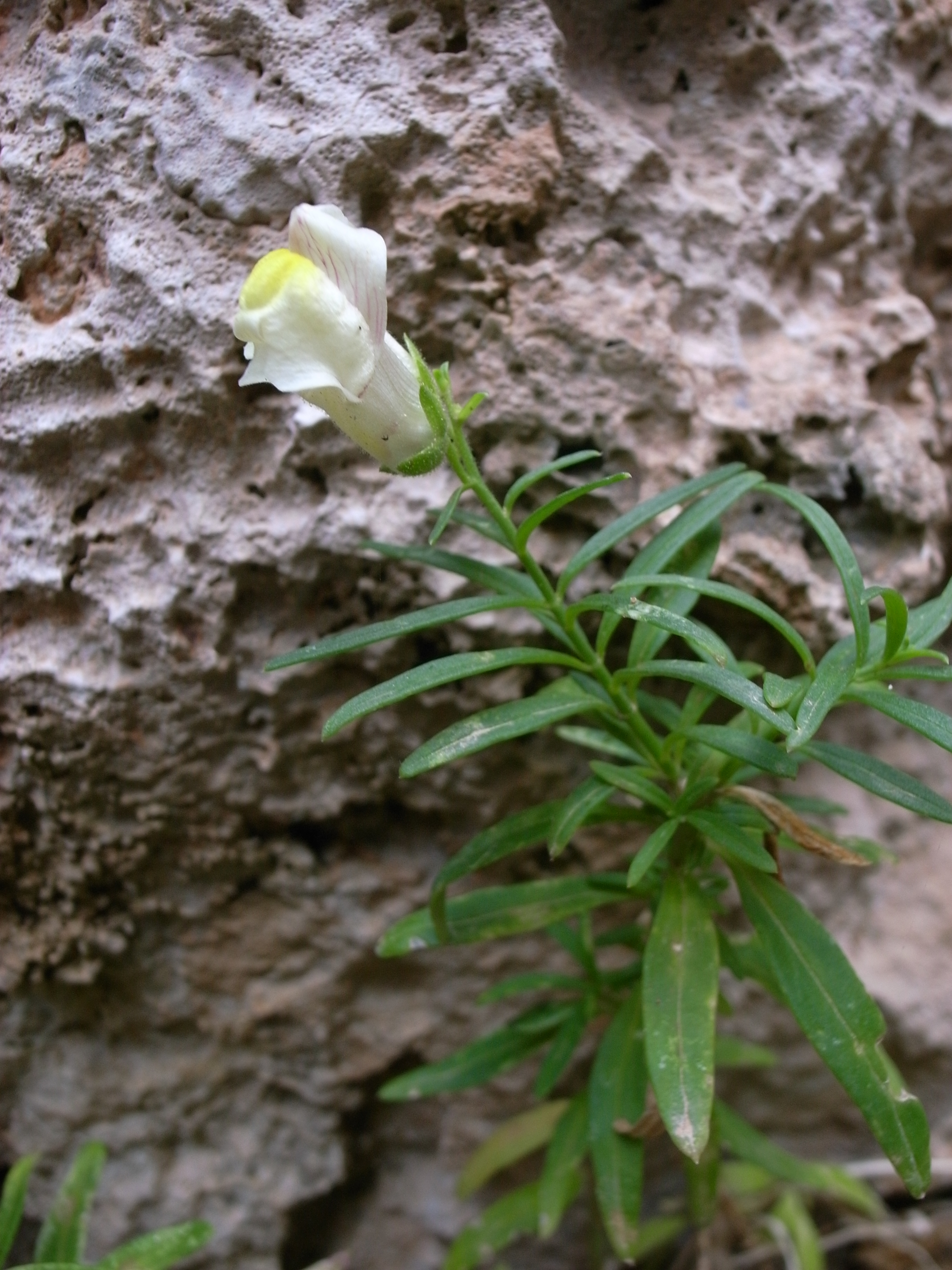 Antirrhinum siculum, Ghajn Tuffieha, Malta